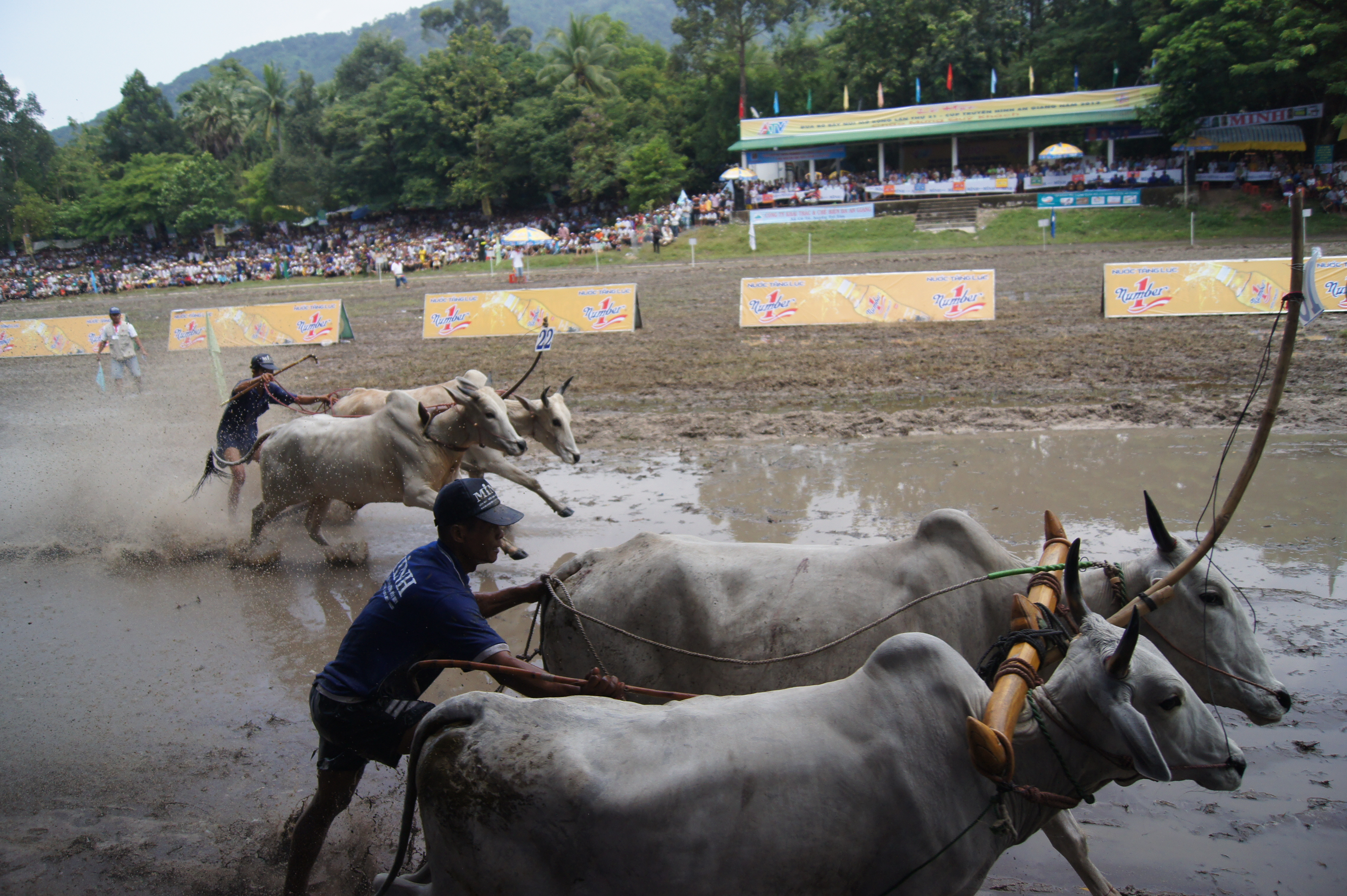 Lễ hội đua bò Bảy Núi năm 2012